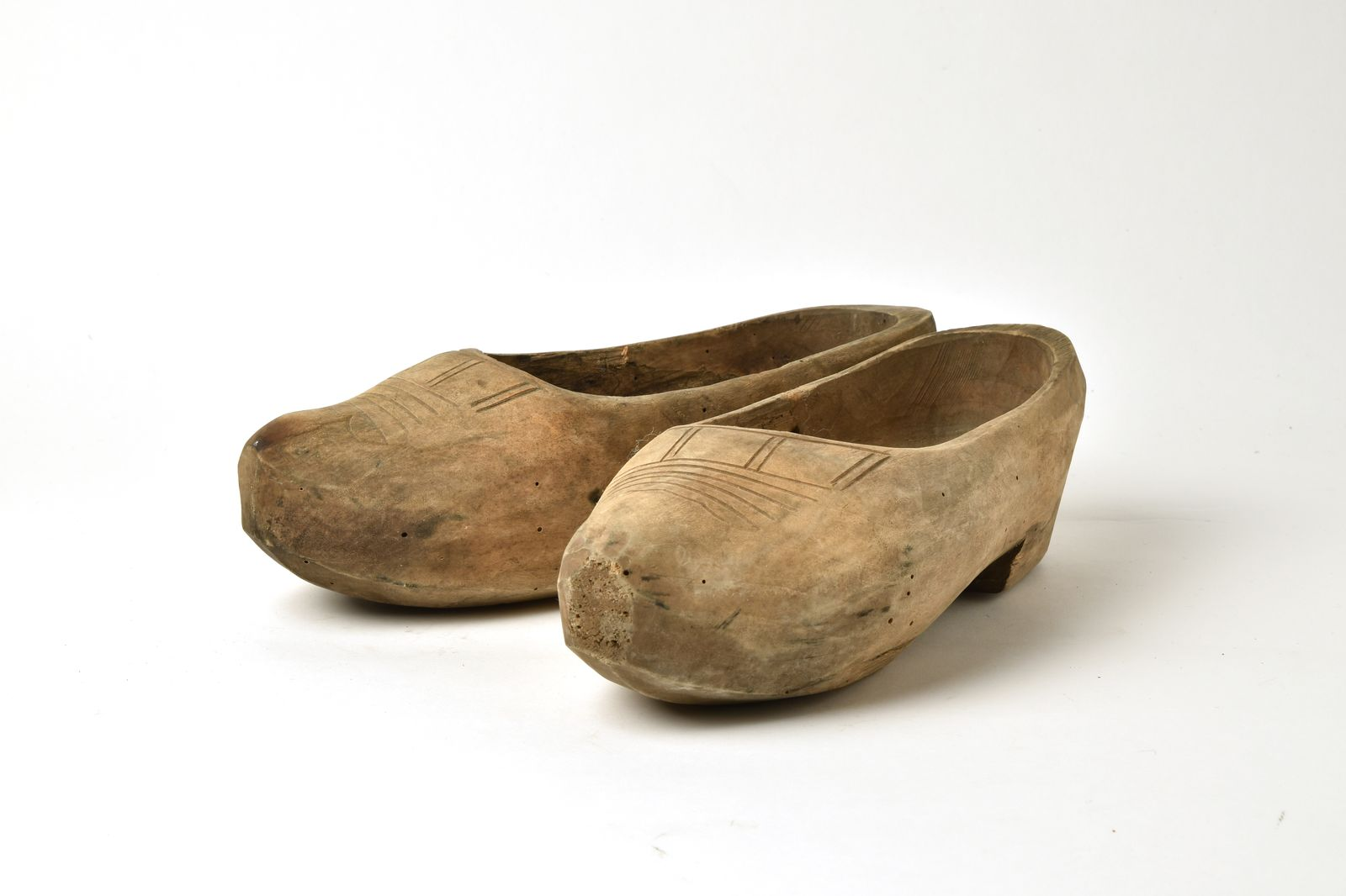 Houten klompen.